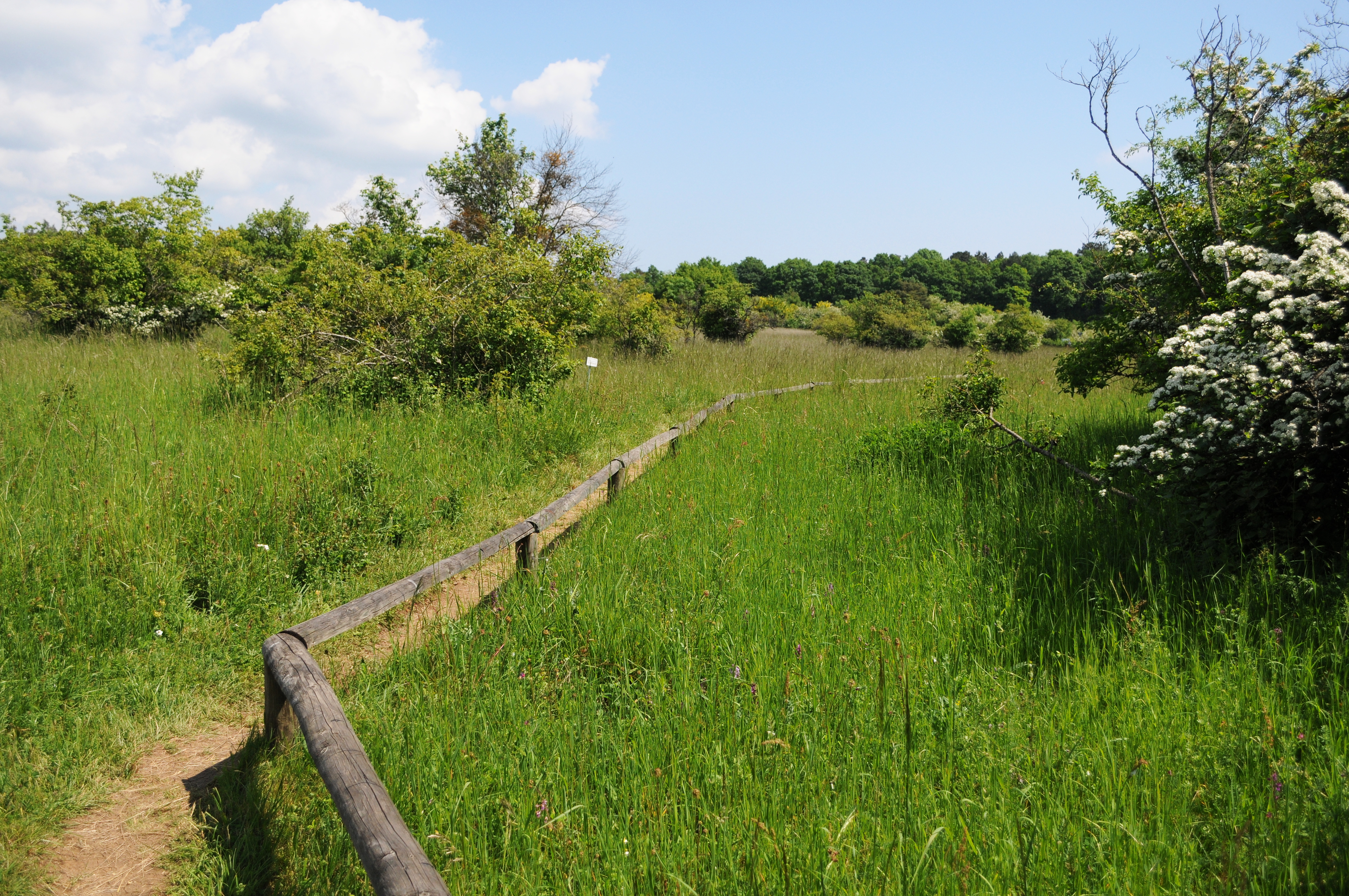 (NSG:RP-7235-086)_Perfeist bei Wasserliesch Orchideenweg Wasserliesch durch das Naturschutzgebiet Perfeist oberhalb der Mosel bei Konz - Gebiet mit Kalkmagerrasen auf dem Liescher Berg